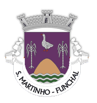 parish logo